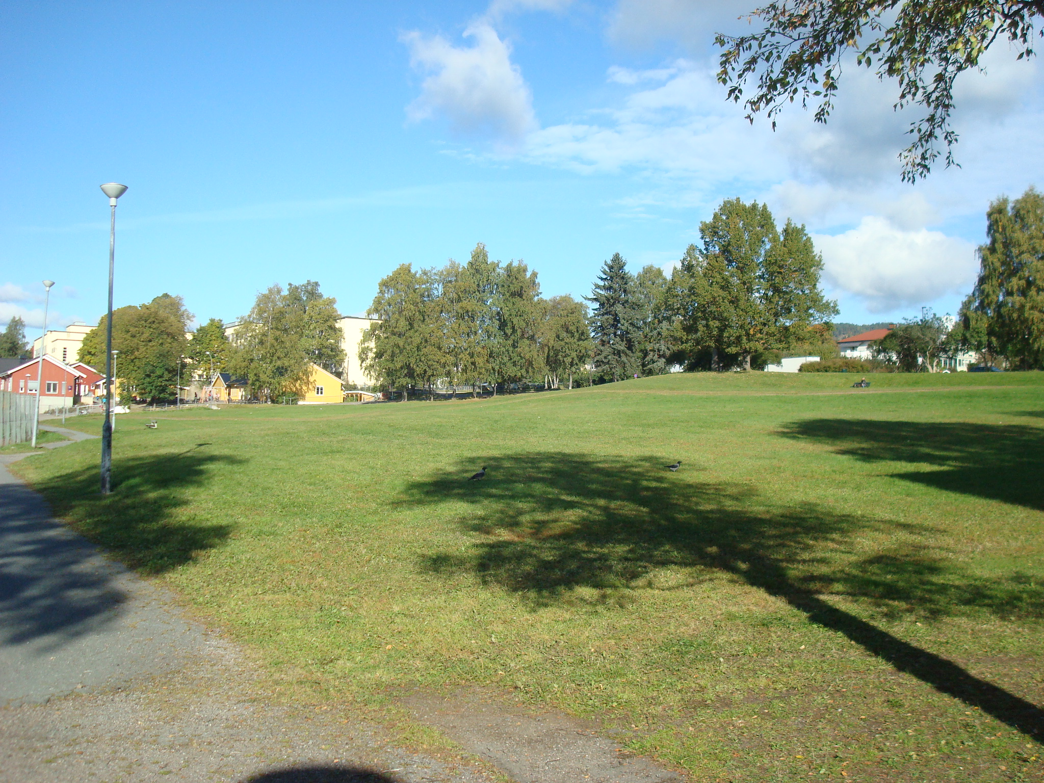 Sinsenparken i Oslo